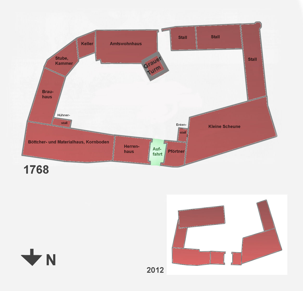 Grundriss Burg Gebhardshagen 1768 und 2012, das Böttcher- und Materialhaus mit Kornboden war früher der Palas